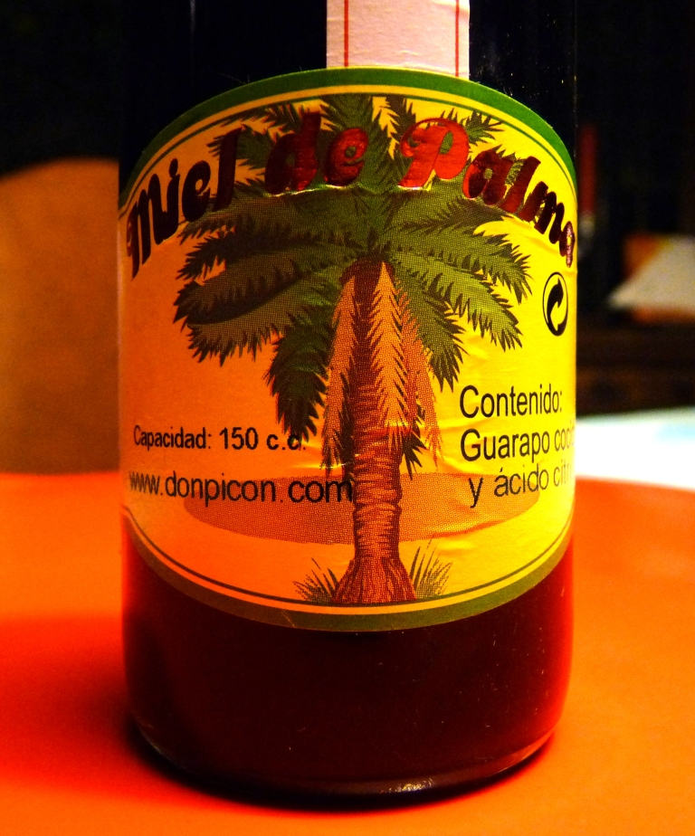 "Palmhonig" aus Kanarischen Dattelpalmen